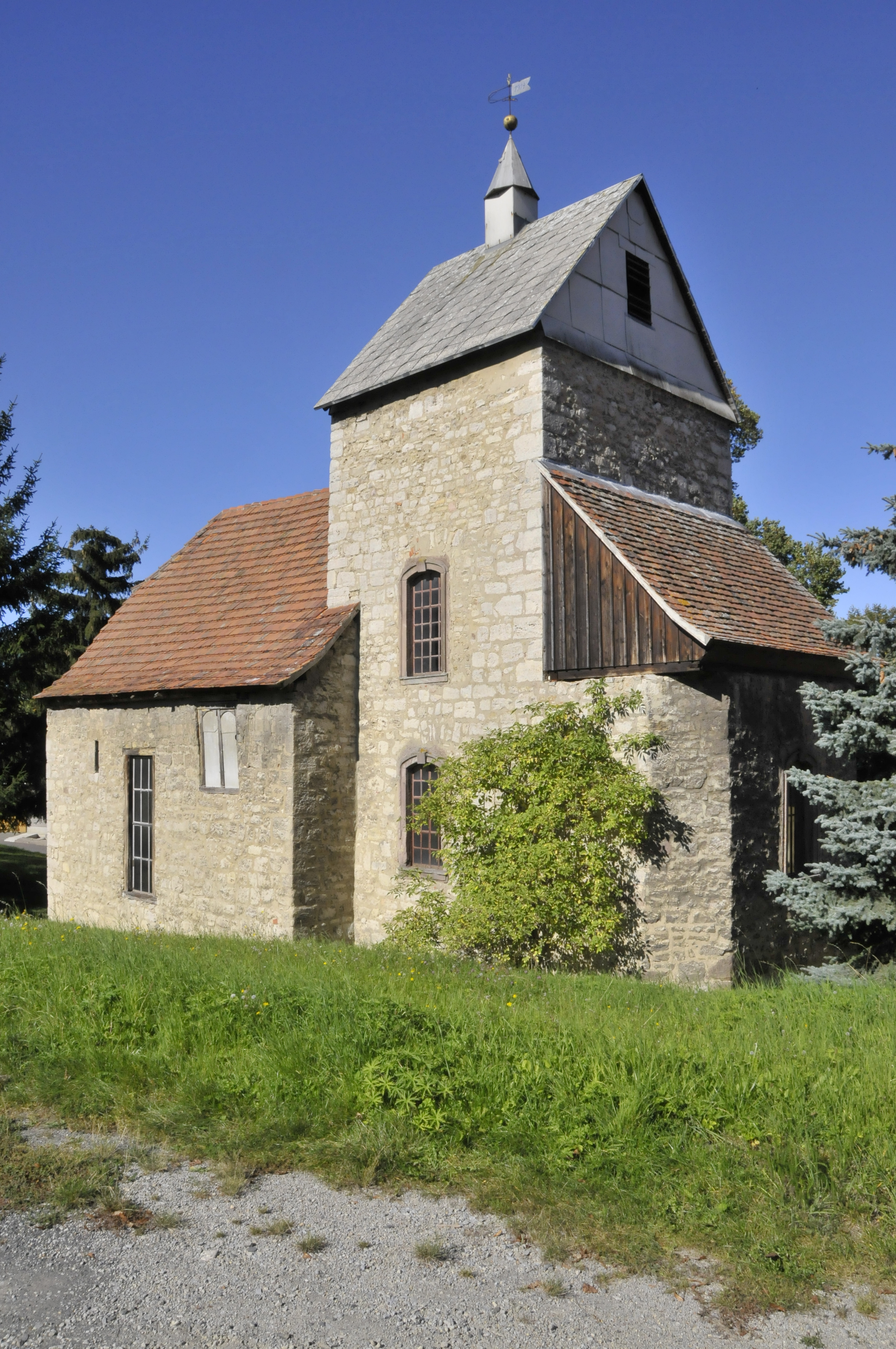 Tromlitz, Kirche